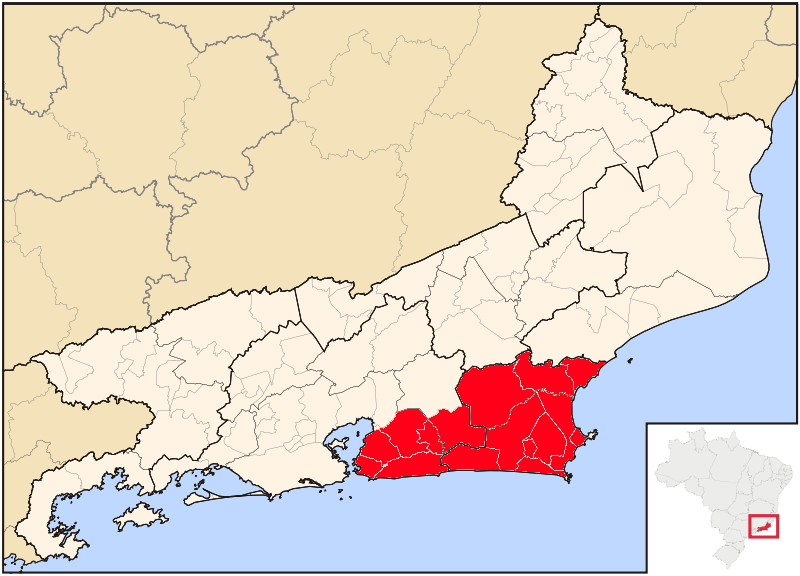 Localização da Região do Leste Fluminense no estado do Rio de Janeiro, Brasil.